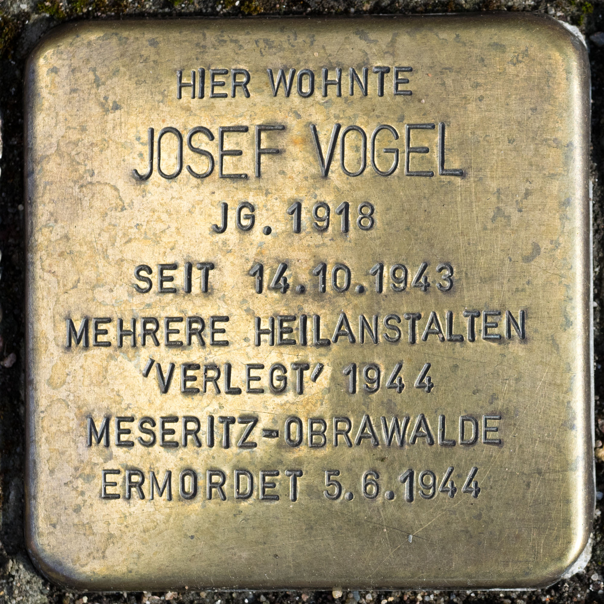 2016 Stolpersteine ToeVo Vogel Josef